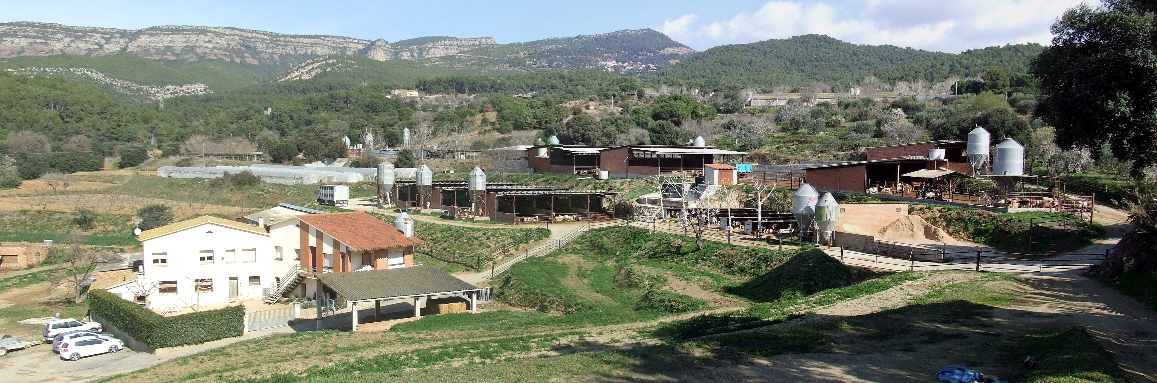 Can Puig i les Granges de Can Puig (Bigues, Bigues i Riells, Vallès Oriental)